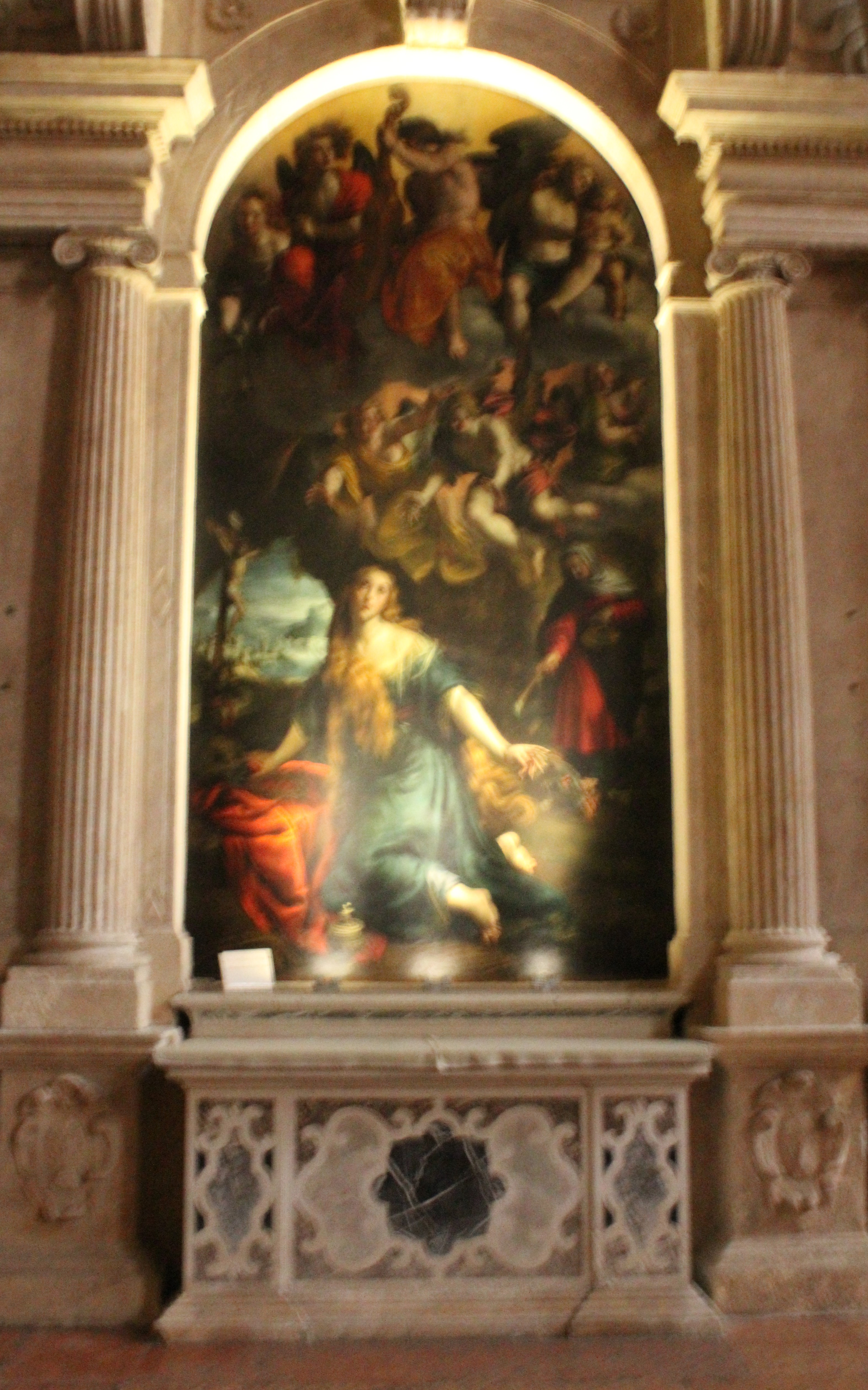 Altare Da Prato. Tela "Estasi di Santa Maria", firmata e datata da Alessandro Turchi. 1606. Chiesa di San Tomaso Cantuariense, Verona